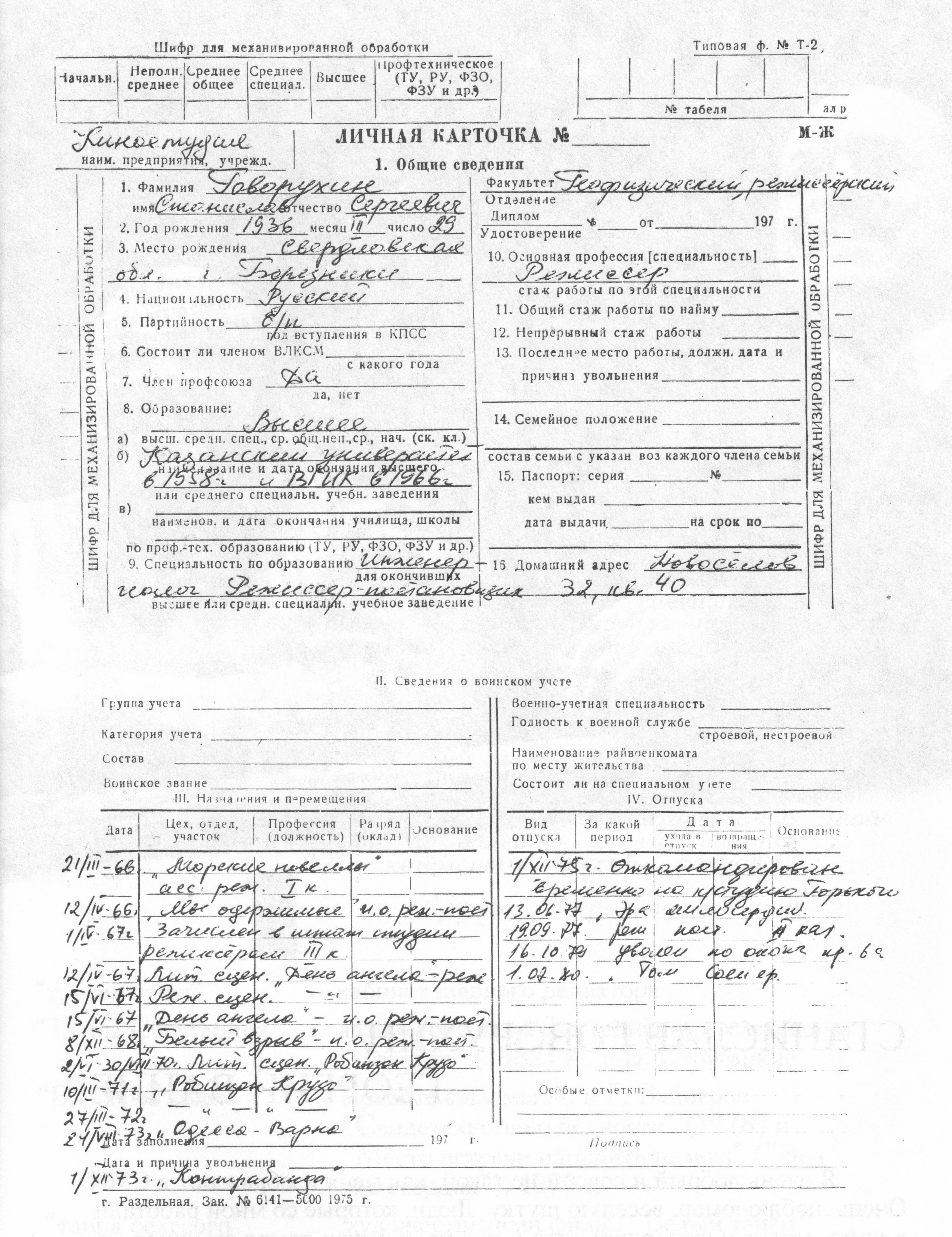 Личная карточка режиссёра Говорухина